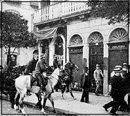 Na cidade de São Paulo durante a greve de 1917 trabalhadores paralisados são reprimidos por policiais a cavalo. Na tradição política e estatal brasileira a questão social de longa data é considerada "caso de polícia".